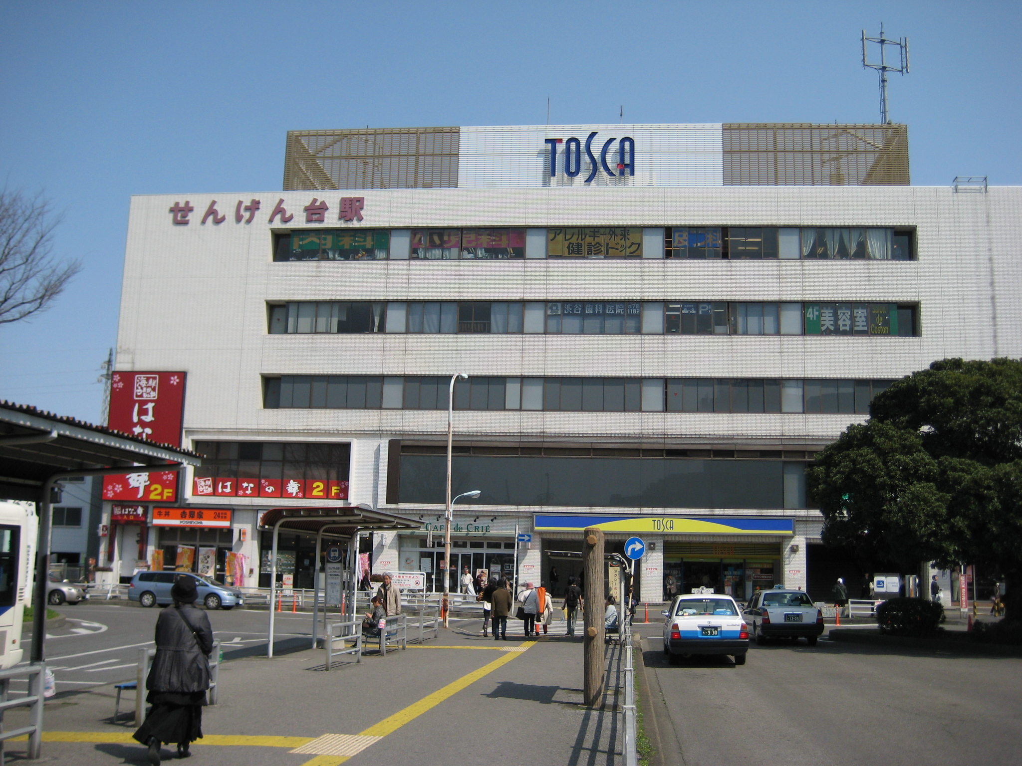 千間台駅西口